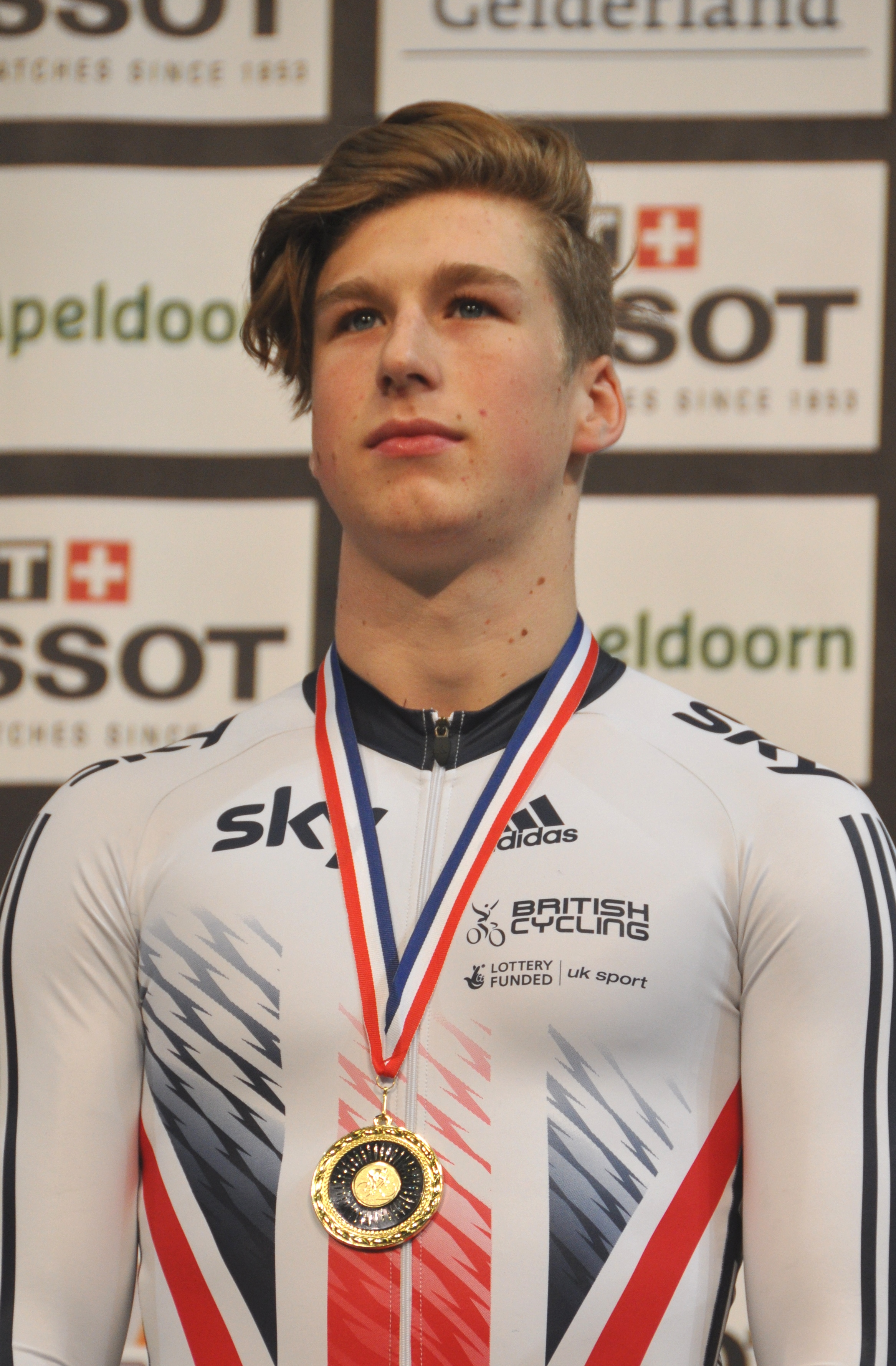 Joe Truman, britischer Radsportler, Gold im Teamsprint